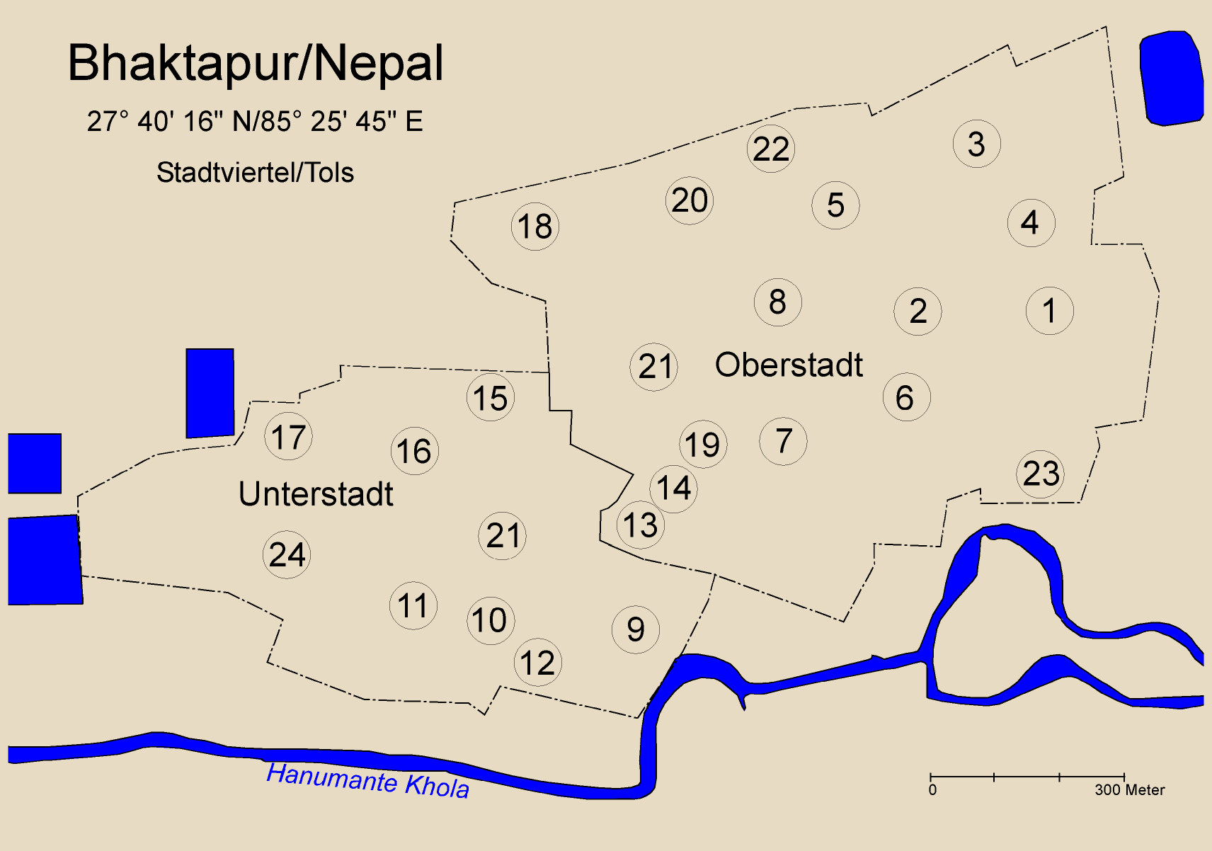 Quarter of Bhaktapur, Nepal